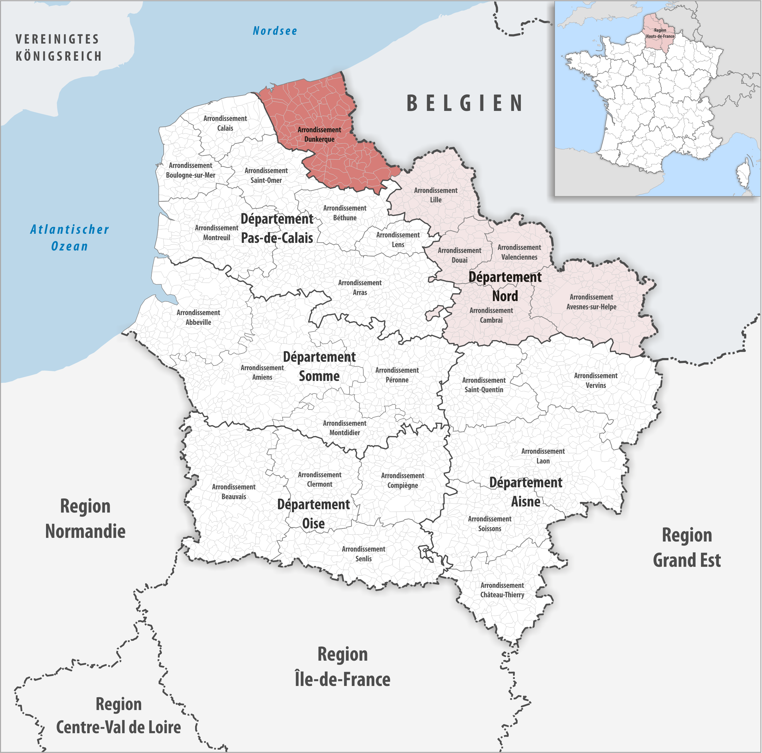 Lage des Arrondissements Dunkerque